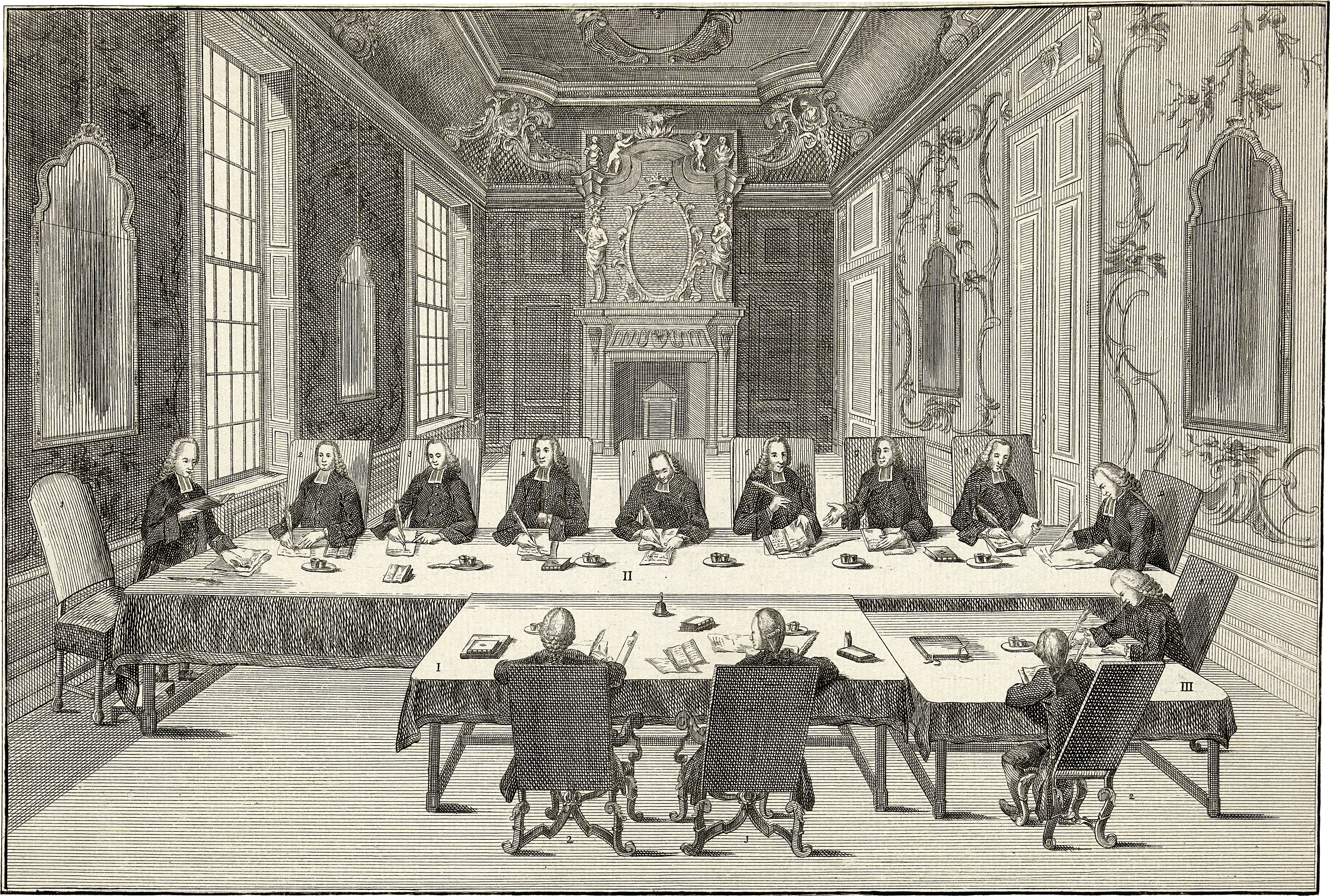 Interieur van het Mauritshuis te Den Haag met een bijeenkomst van de Commissie ter Verbetering van de Rijmpsalmen, die bijeen kwam van 12 januari tot en met 19 juli 1773. Op het blad onder de plaat in boekdruk de titel en in vier kolommen de namen van de voorgestelde leden van de commissie. "Vergaader-Zaal, op het Huis van Prins Maurits in 's Haage, voor de Commissie ter Verbetering der Rym-Psalmen, Begonnen 12 Januarij, en geëindigd 19 Julij 1773" (titel op object)